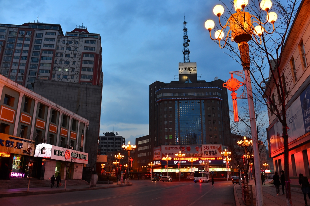 巡道工出品 photo by Xundaogong——通化夜景